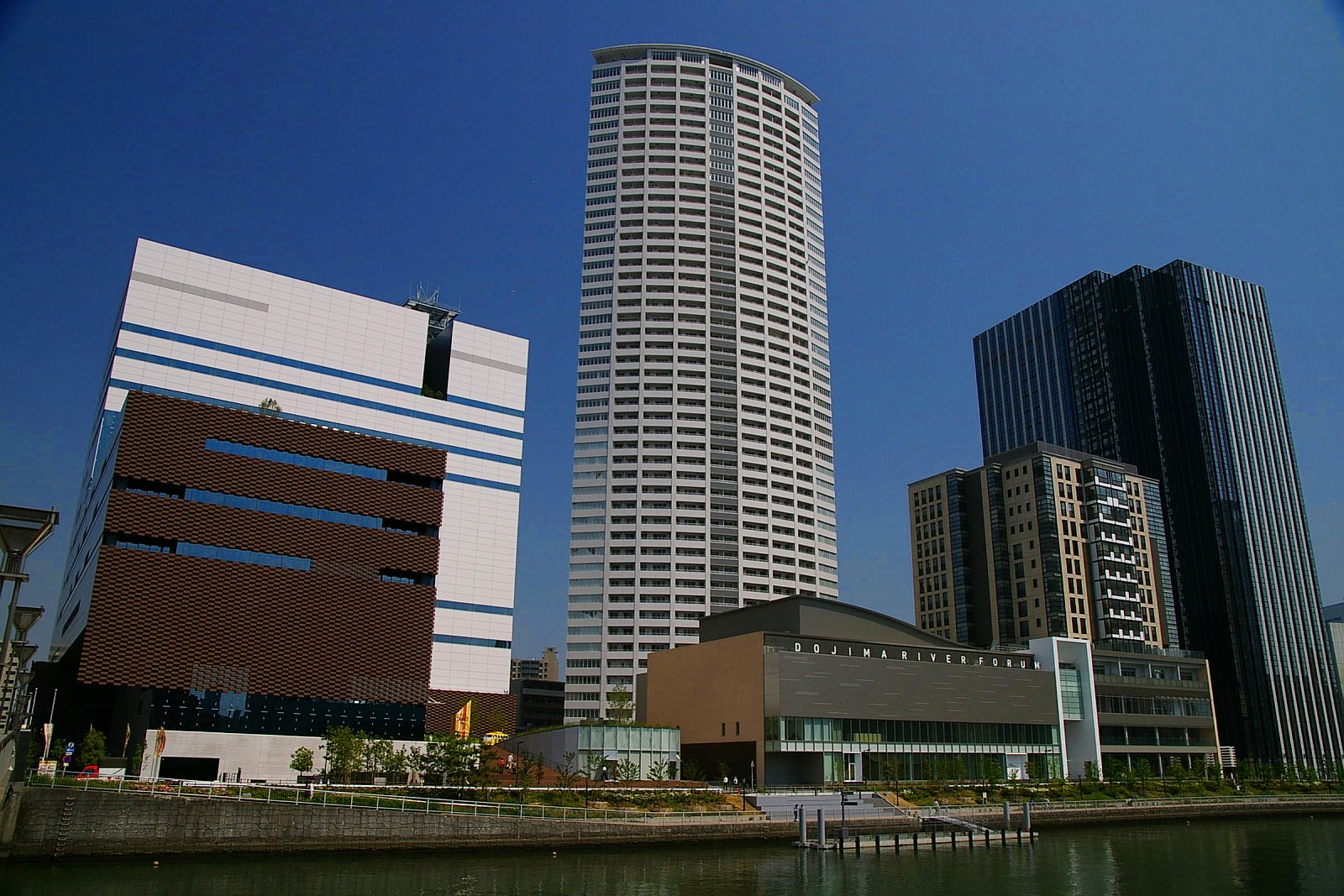 Hotarumachi, Fukushimaku, Osaka City, Japan.